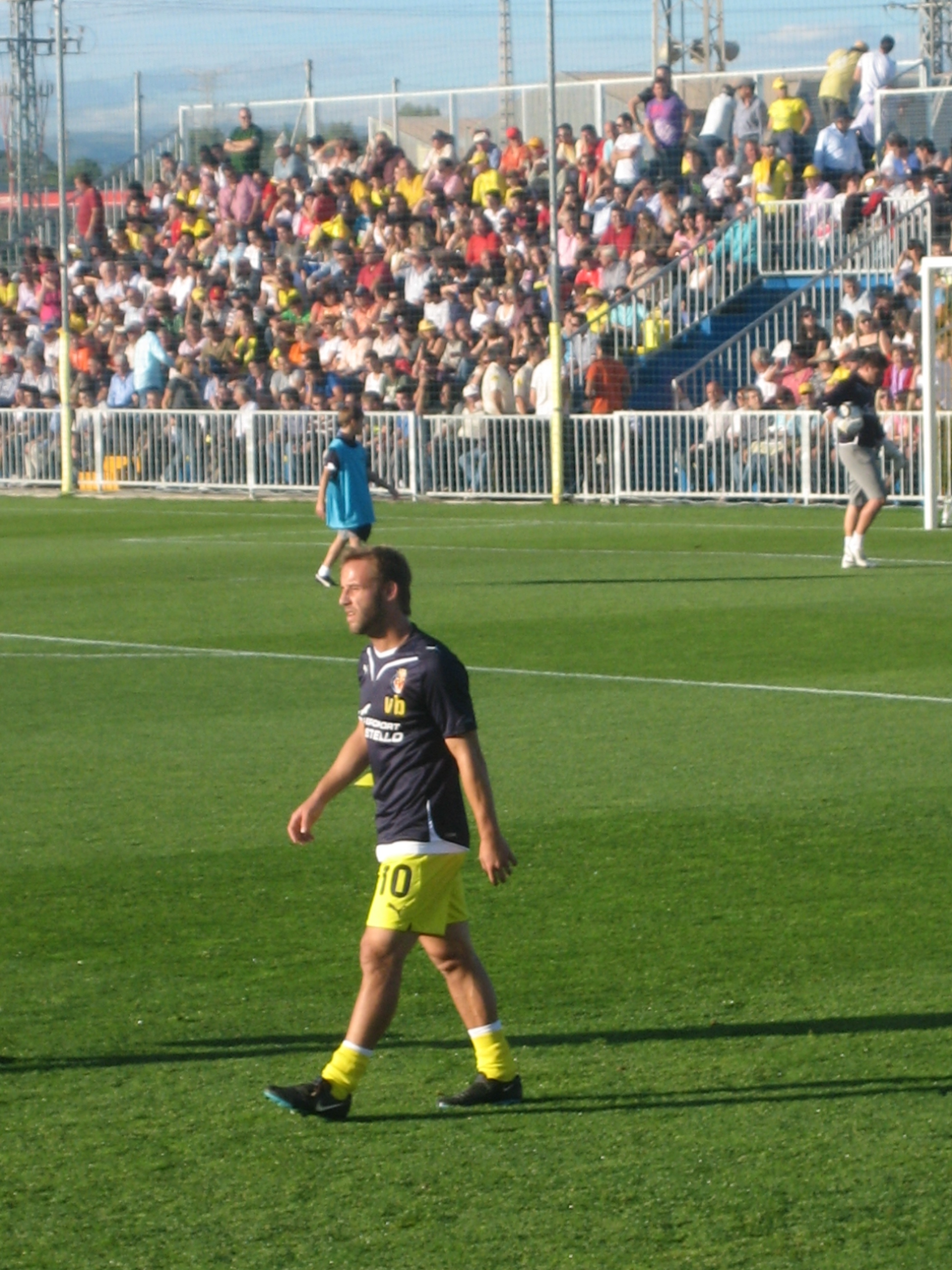 Joan Tomás en la seva etapa com a jugador del Villarreal Club de Fútbol "B" en el calfament previ al Villarreal CF "B" - CD Castellón de la temporada 2009-10 a la Ciutat Esportiva del Villarreal.